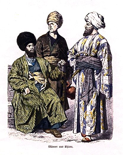 Men from Khiva